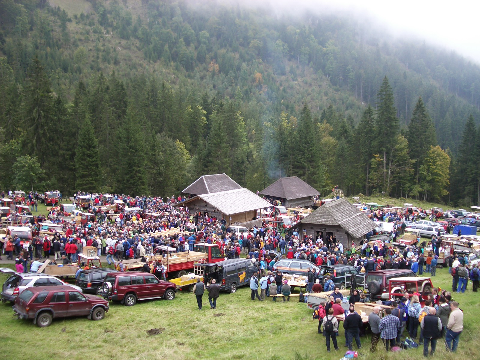 Chästeilet Justistal BE, Schweiz